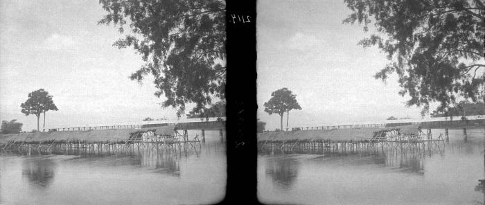 Negatief. Een brug over de rivier Batang Merangin, Sumatra's Westkust